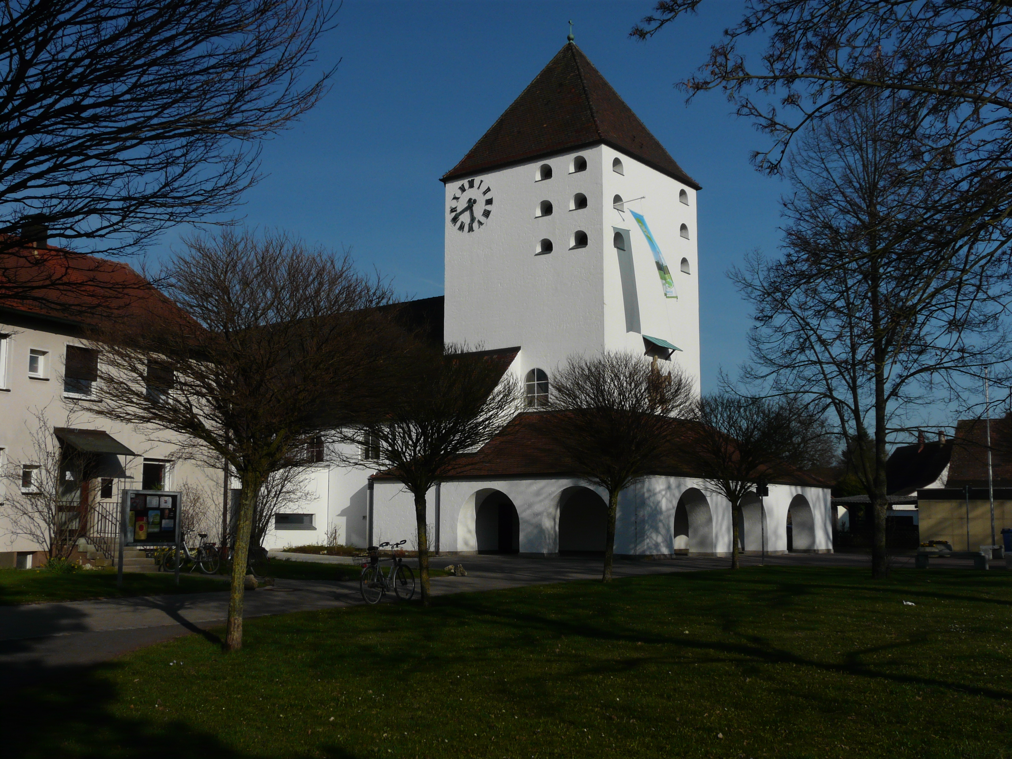 Die Auferstehungskirche im Nürnberger Ortsteil Fischbach